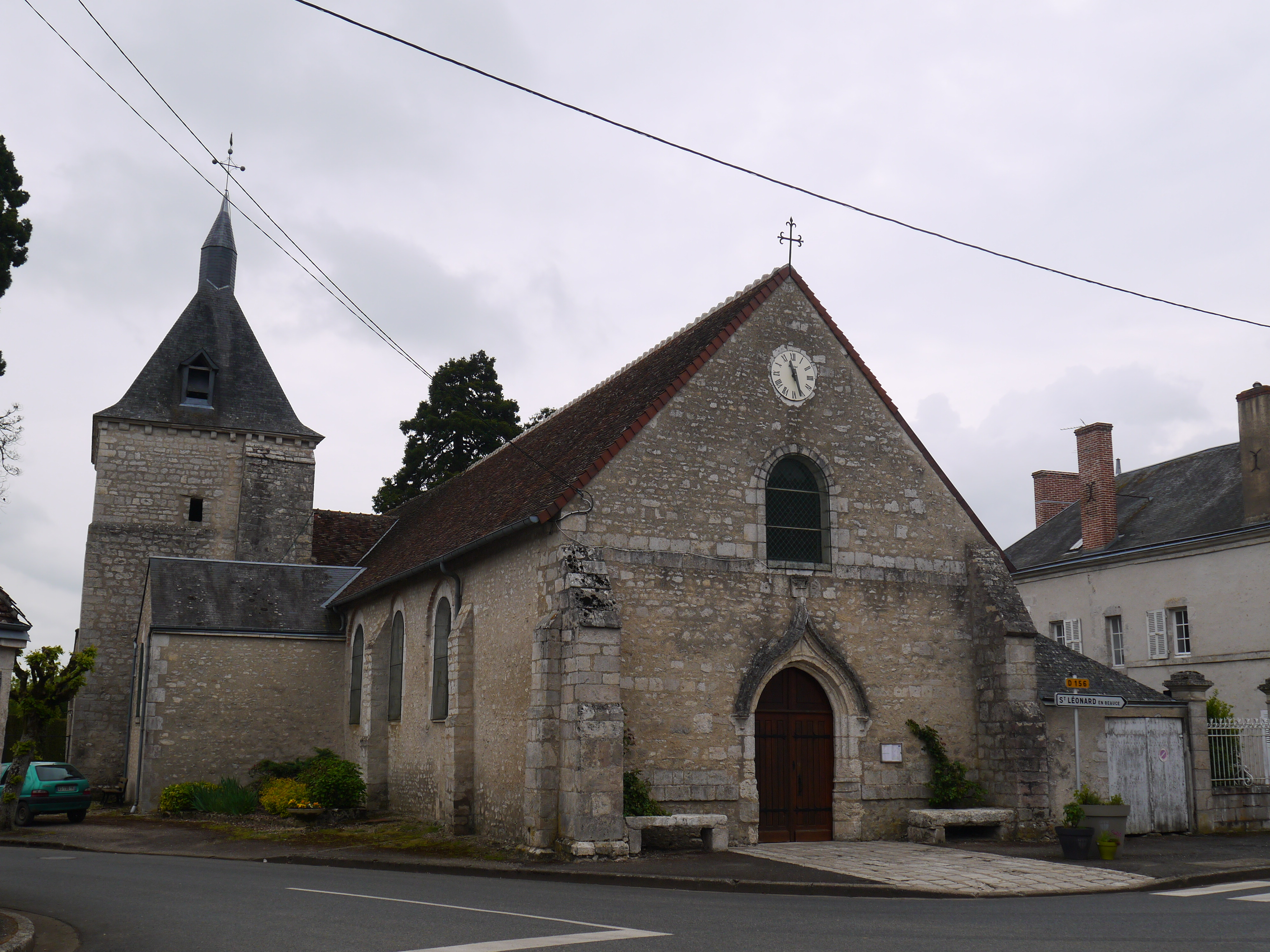 L'église Saint-Sulpice.